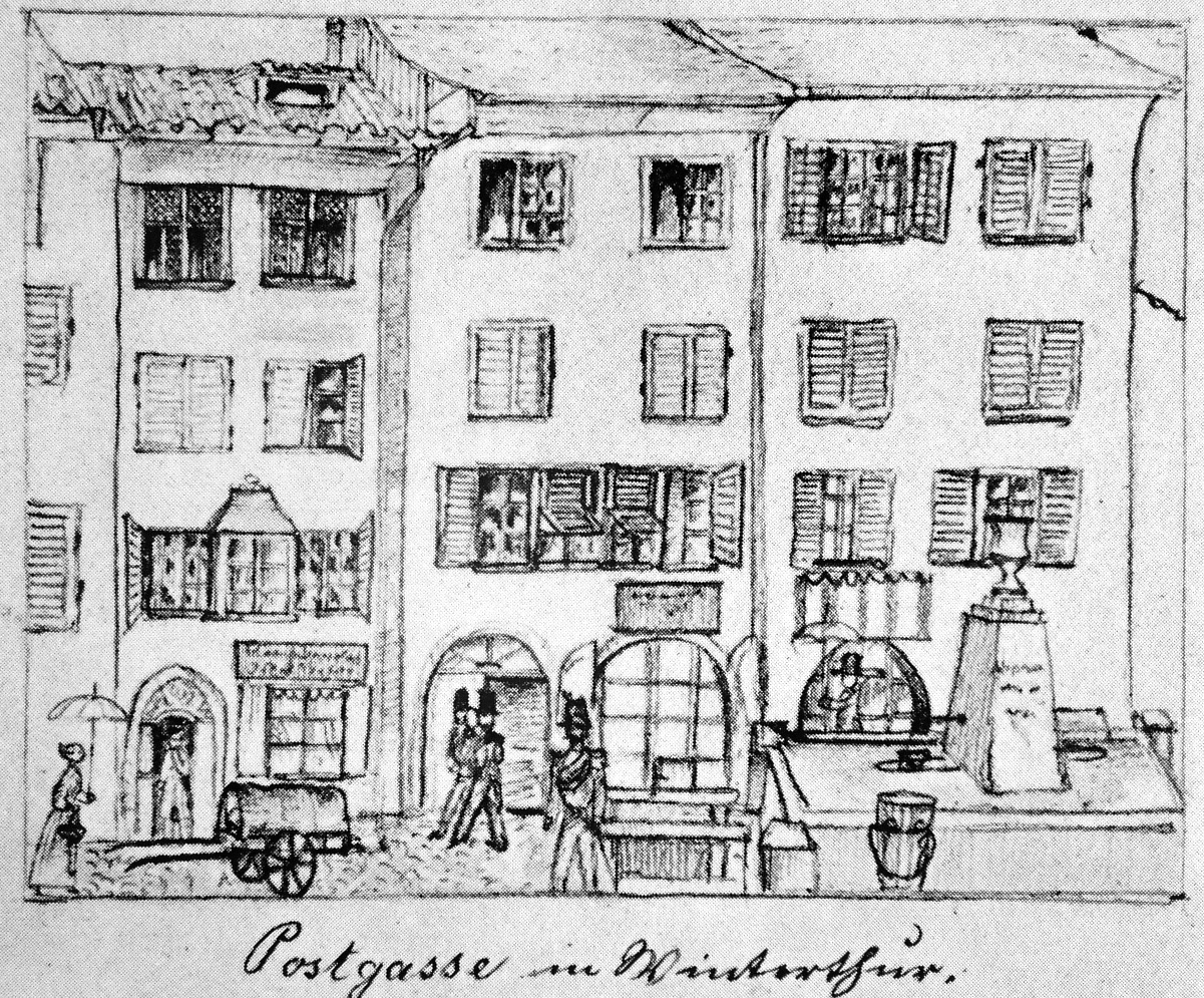 Johann Rudolf Rahn Postgasse in Winterthur, 1853